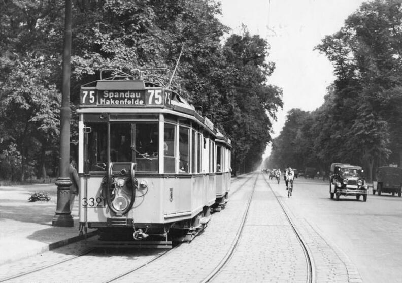 Scherl: Kein Strassenbahnverkehr mehr in der Charlottenburger Chaussee Im Laufe dieses Jahres werden infolge des ständig steigenden Kraftwagenverkehrs die Strassenbahnen aus der Charlottenburger Chaussee verschwinden und durch Omnibusse ersetzt. 24361-34